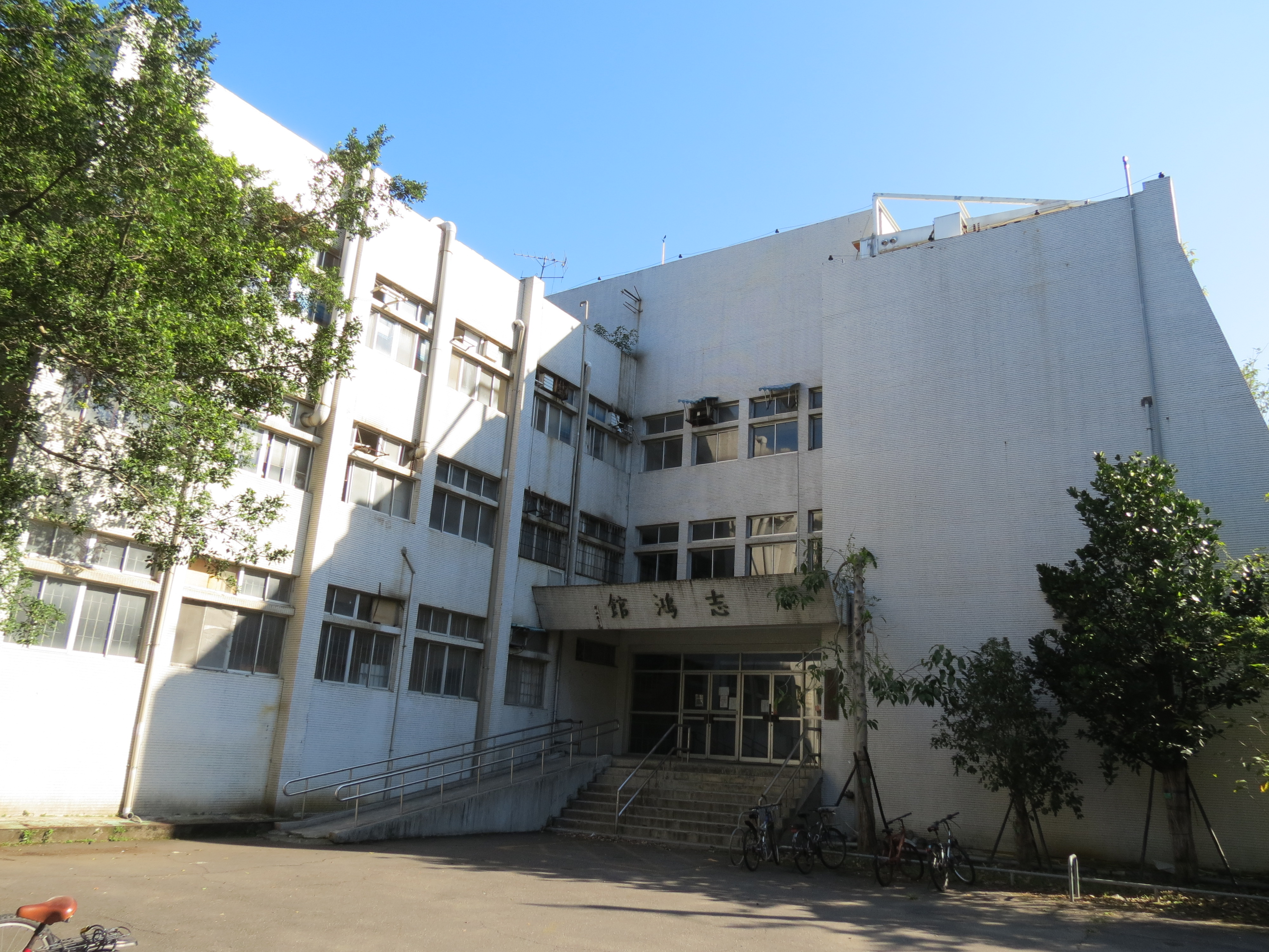 中文（台灣）: 台大志鴻館全面